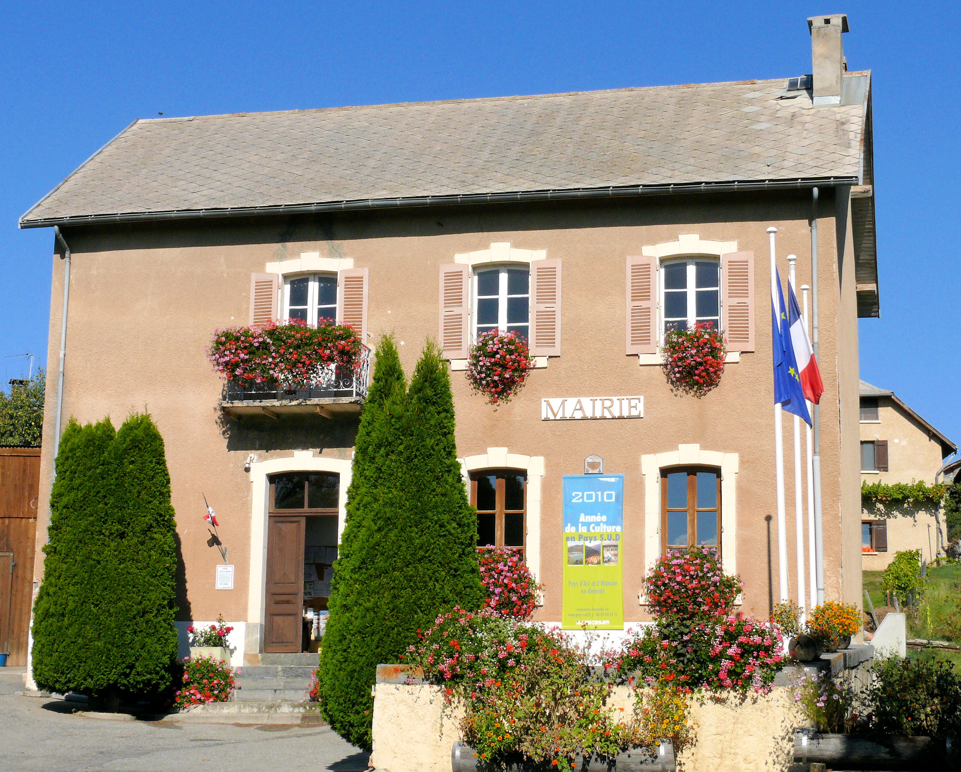 Sauze-du-Lac - La mairie